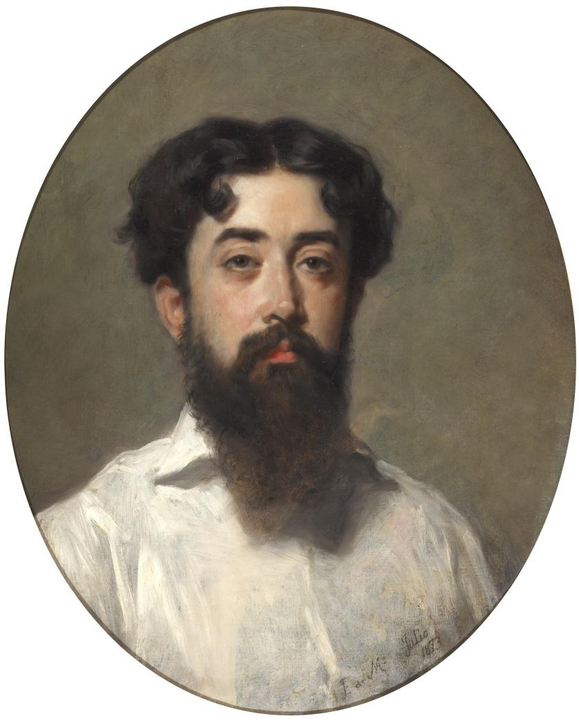 Retrato del pintor español Pablo Gonzalvo (1827-1896).